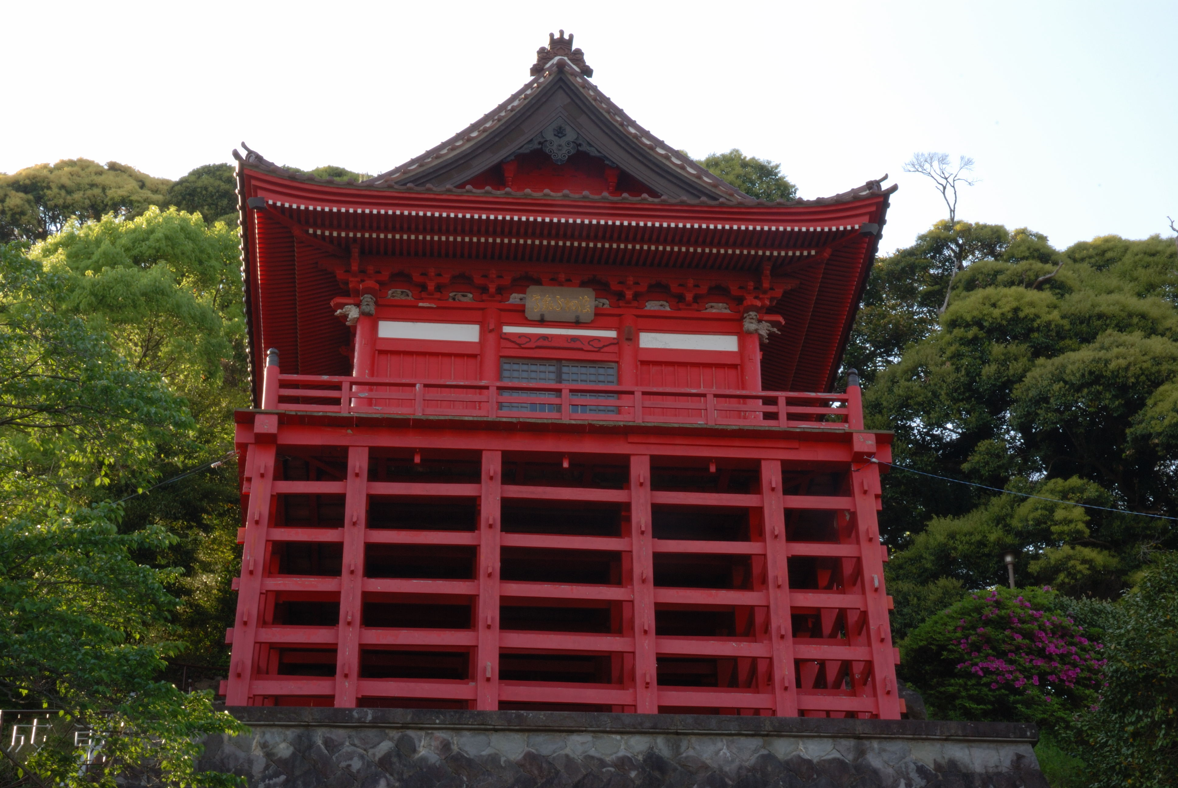 Hondo